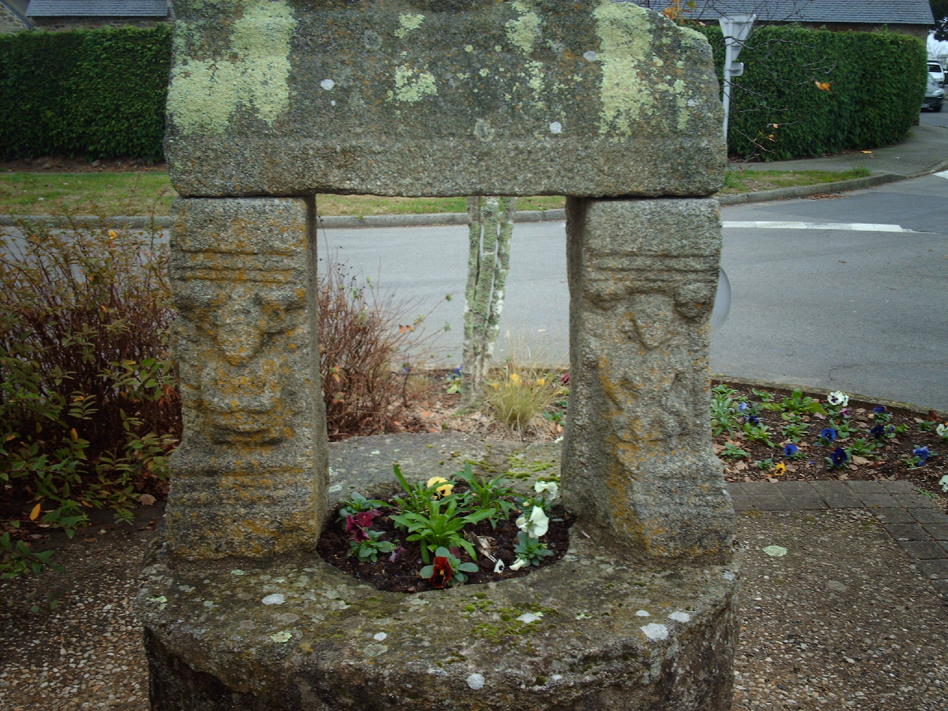 Puits datant du 18eme Siecle Ploeren(56)